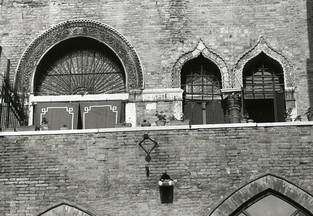 Servizio fotografico : Venezia, 1969 / Paolo Monti. - Strisce: 7, Fotogrammi complessivi: 38 : Negativo b/n, gelatina bromuro d'argento/ pellicola ; 35 mm. - ((I fotogrammi hanno una doppia numerazione. . - Sul portanegativi: Nikon FP4. - Sul dorso del portanegativi Monti specifica: "Riflessi, particolari". - Probabilmente questa specifica in penna biro rossa si riferisce a ricerche personali che esulano dal contesto del servizio commissionato da Electa. - I soggetti sono elencati all'interno del portanegativi. - Occasione: Pubblicazione: "Edoardo ARSLAN, Venezia gotica: architettura civile gotica veneziana, Milano, Electa, 1970"